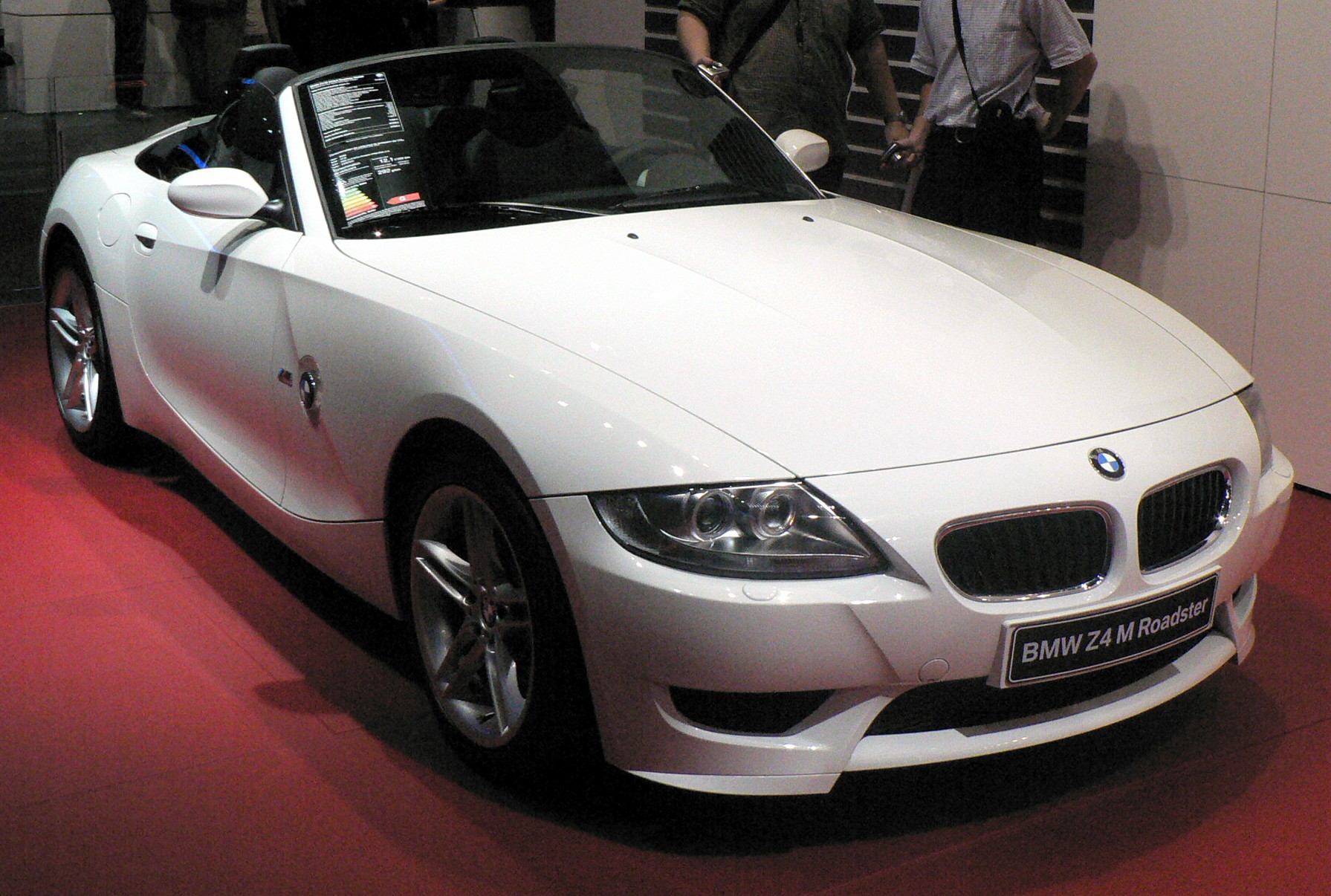 Mondial de l'automobile, Paris 2006